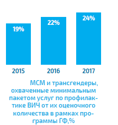 МСМ и трансгендеры, охвачены минимальным пакетом услуг по профилактике ВИЧ